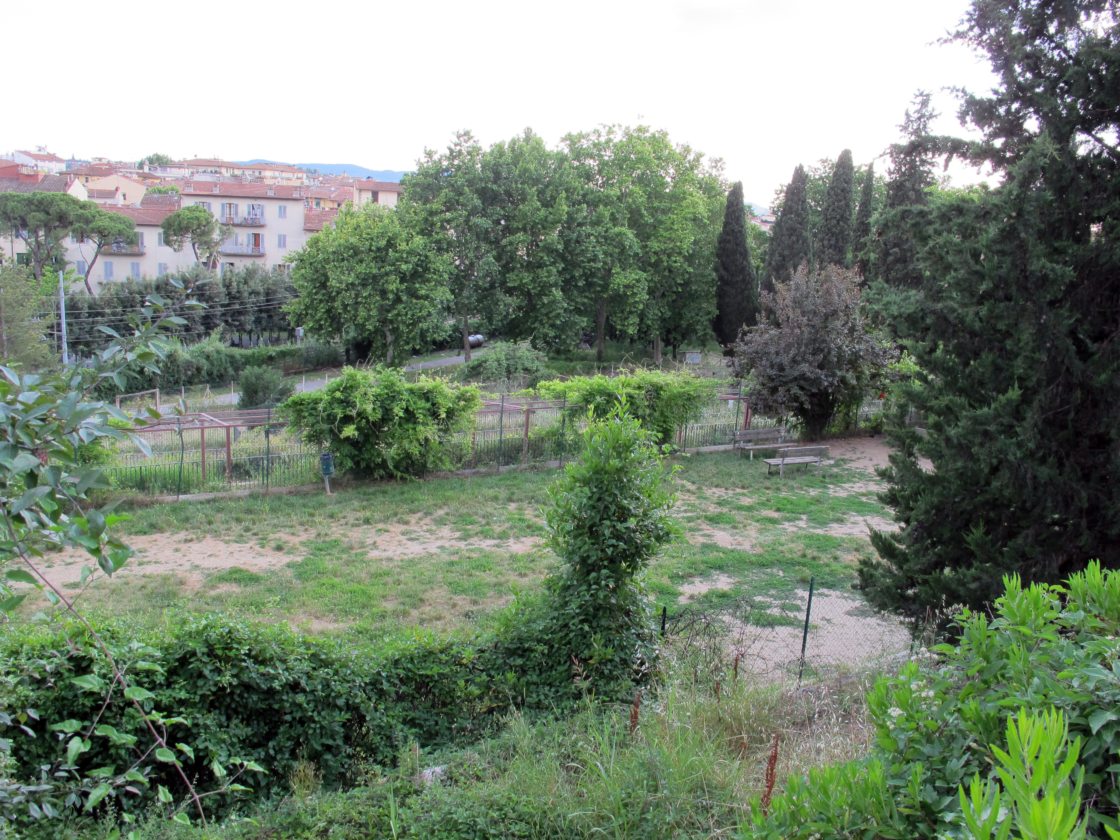 Giardino dei giusti, firenze